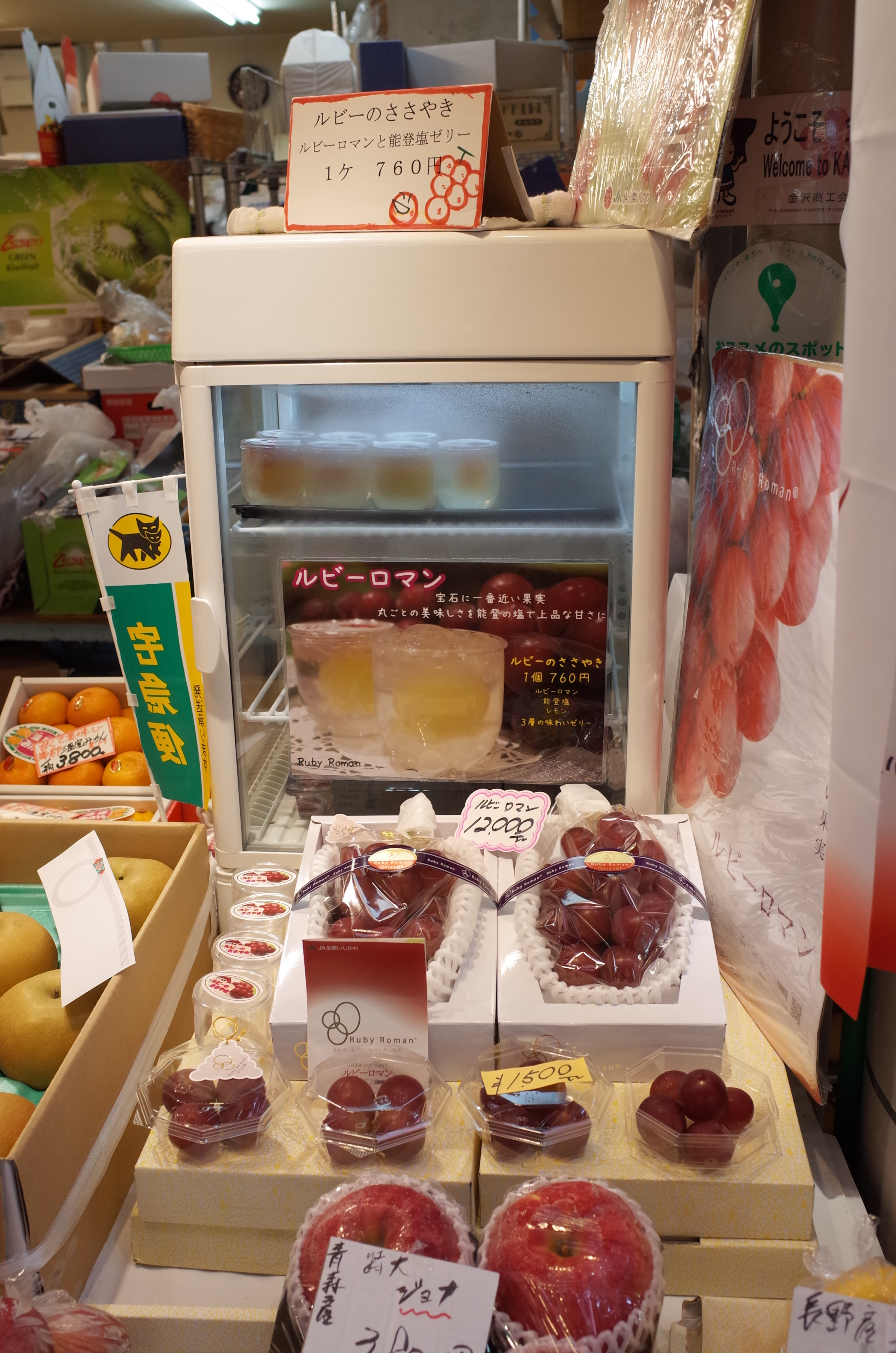 金沢 近江町